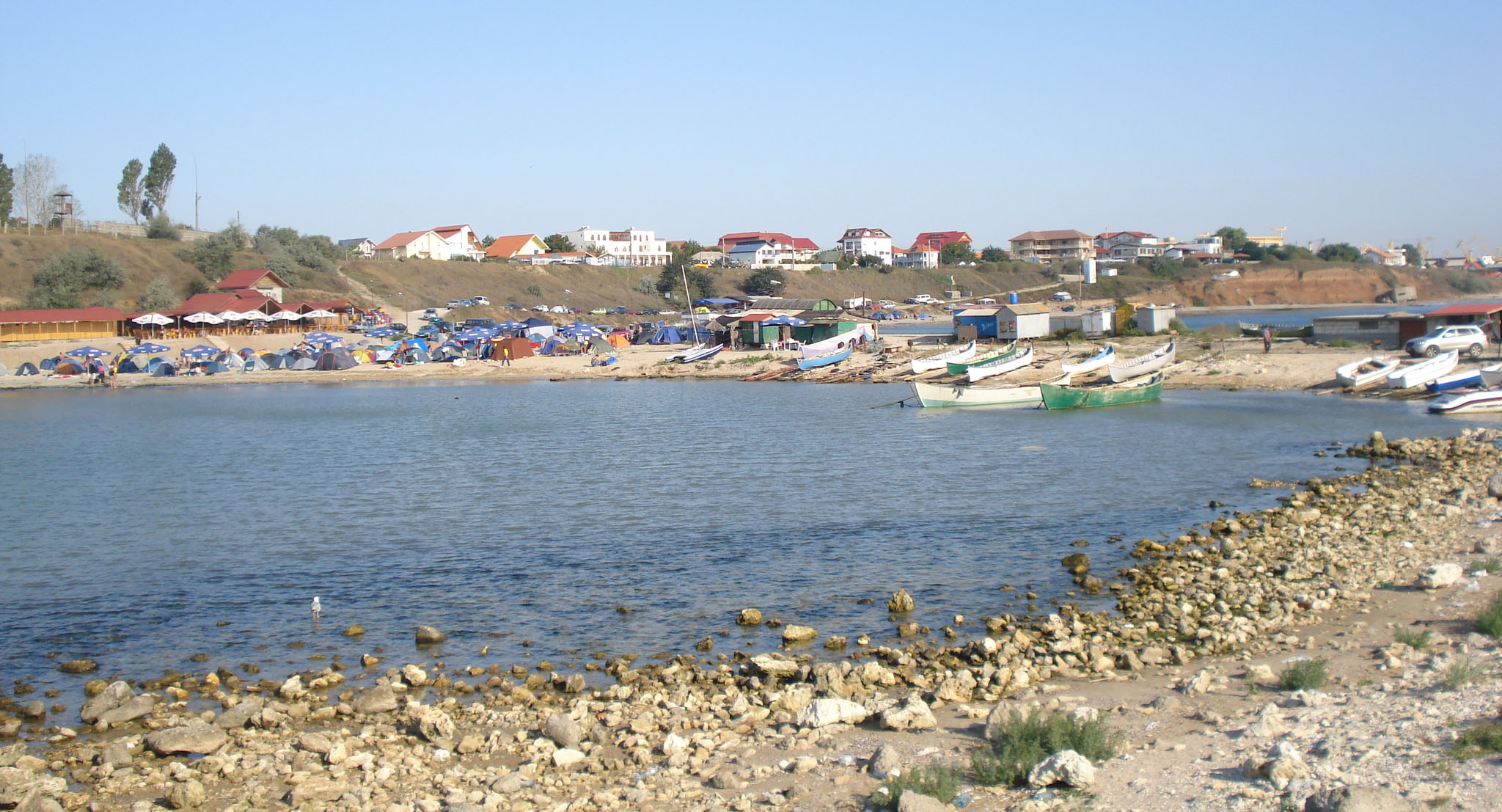 Die Schwarzmeerküste bei dem Ort 2 Mai